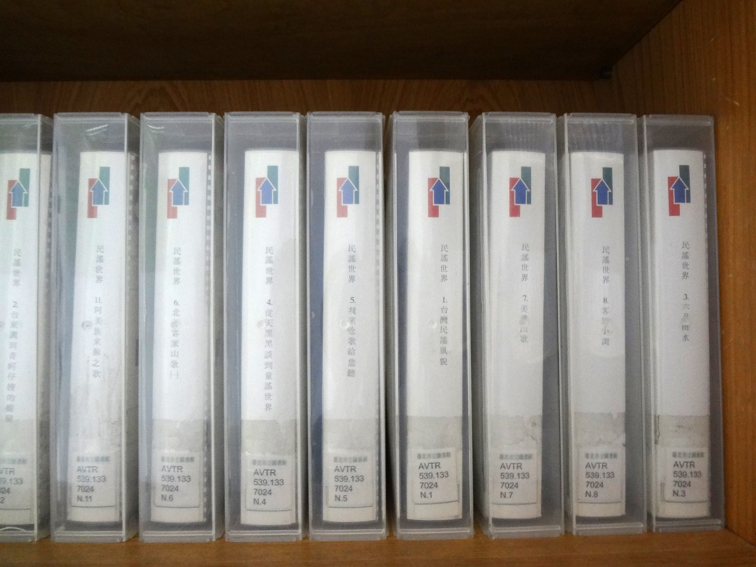 臺北市立圖書館西湖分館收藏的廣電基金節目《民謠世界》錄影帶。